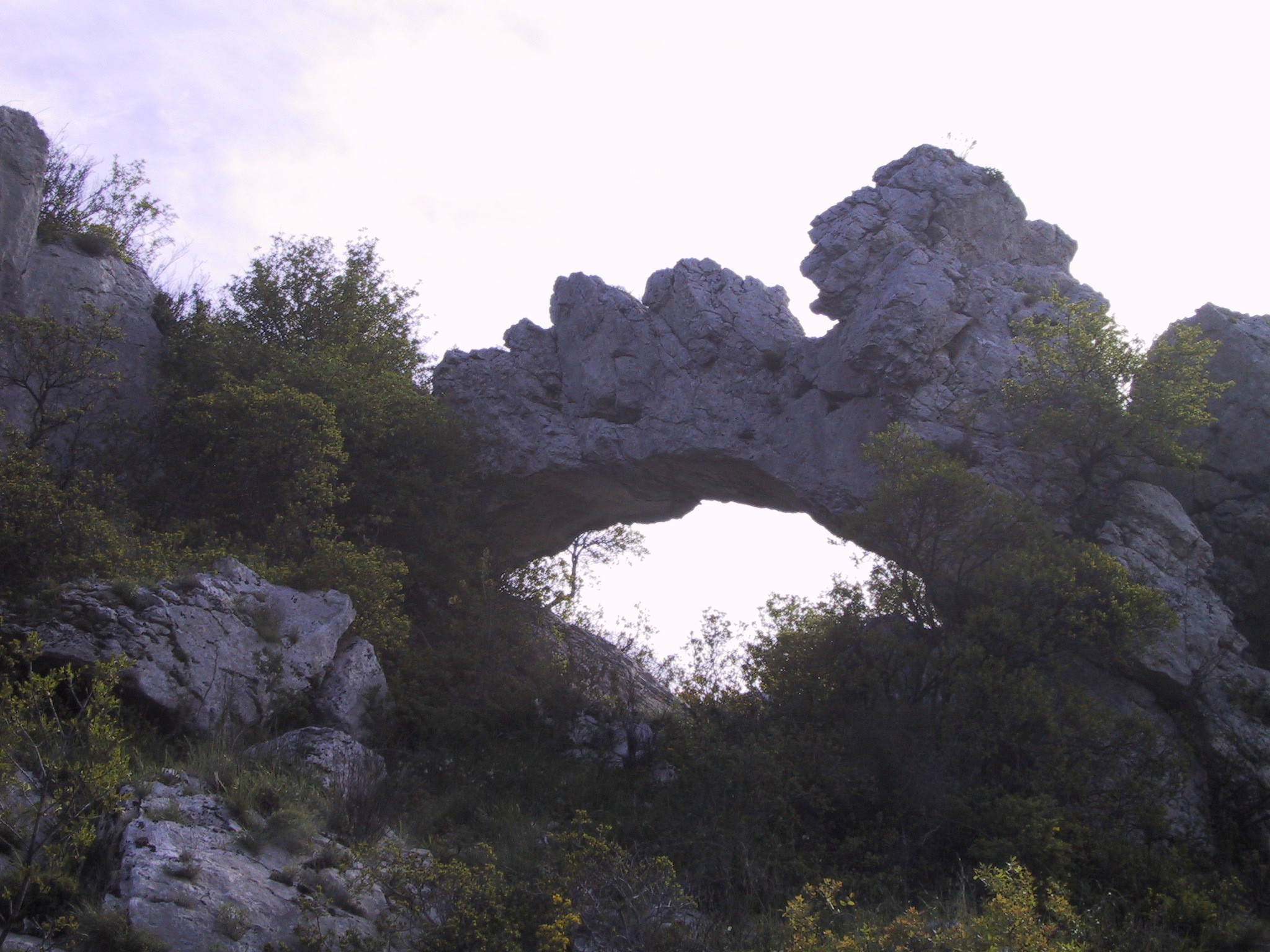 Spodmoli (Ušesa Istre) pri Sočergi